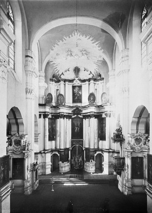 Беларуская (тарашкевіца): Полацак (Połacak), Верхні Замак (Vierchni Zamak). Царква Сьвятой Соф'і, інтэр'ер